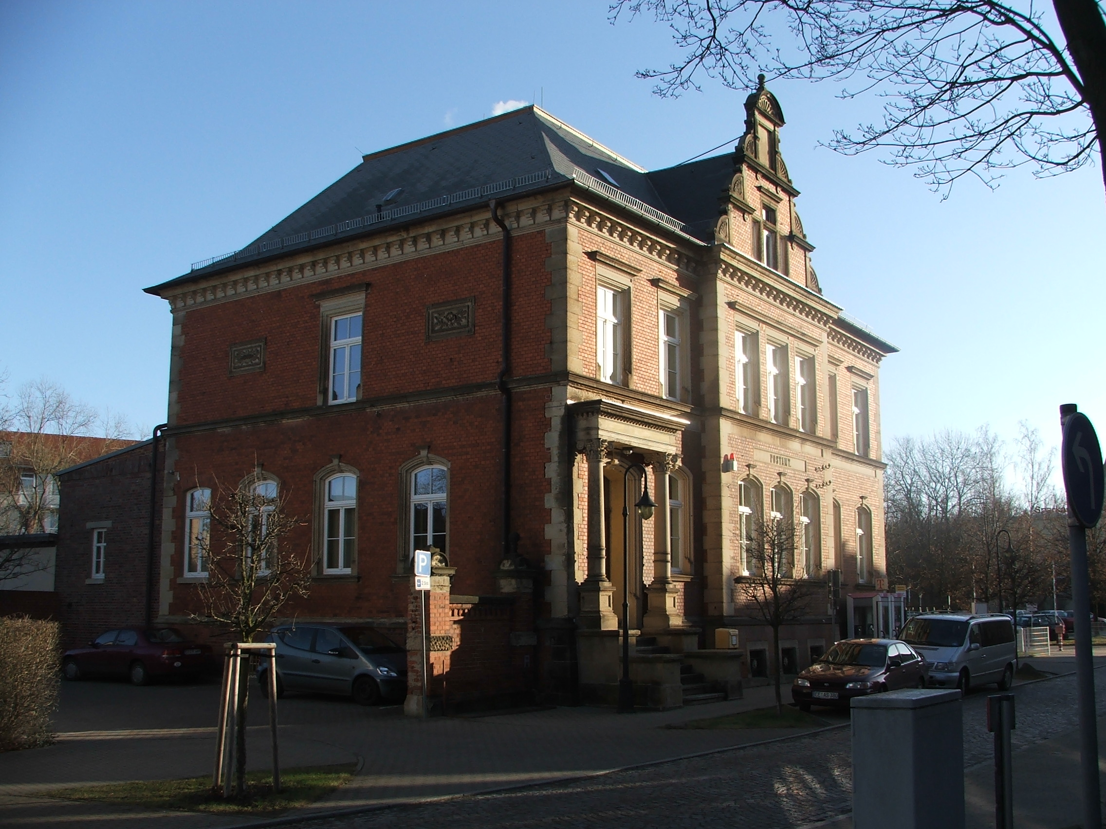 alte Post in Bad Liebenwerda